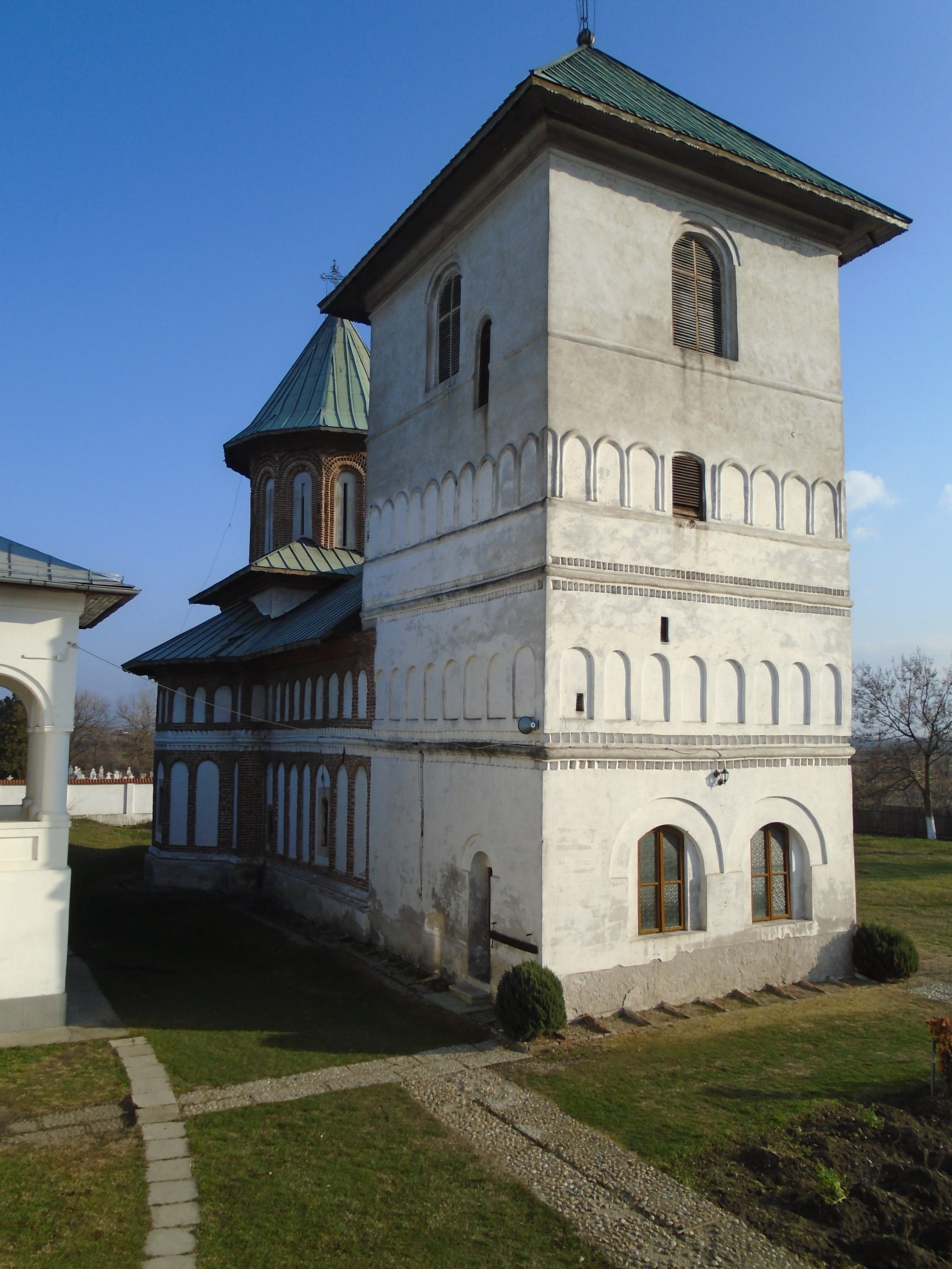 Construit în anul 1802 ca turn de veghe și de transmitere a semnalelor